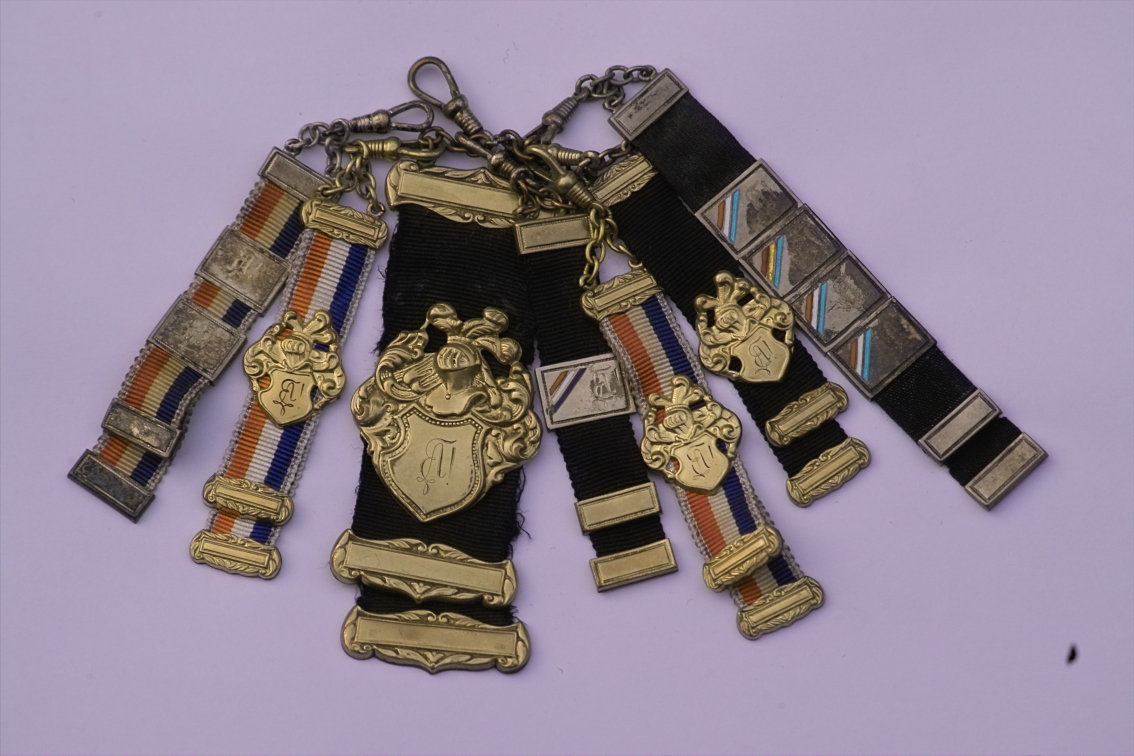 Zipfel des KStV Arminia Bonn